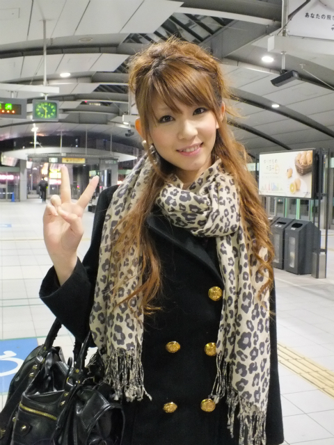 ディファ有明イベント後の馬越幸子さんです。